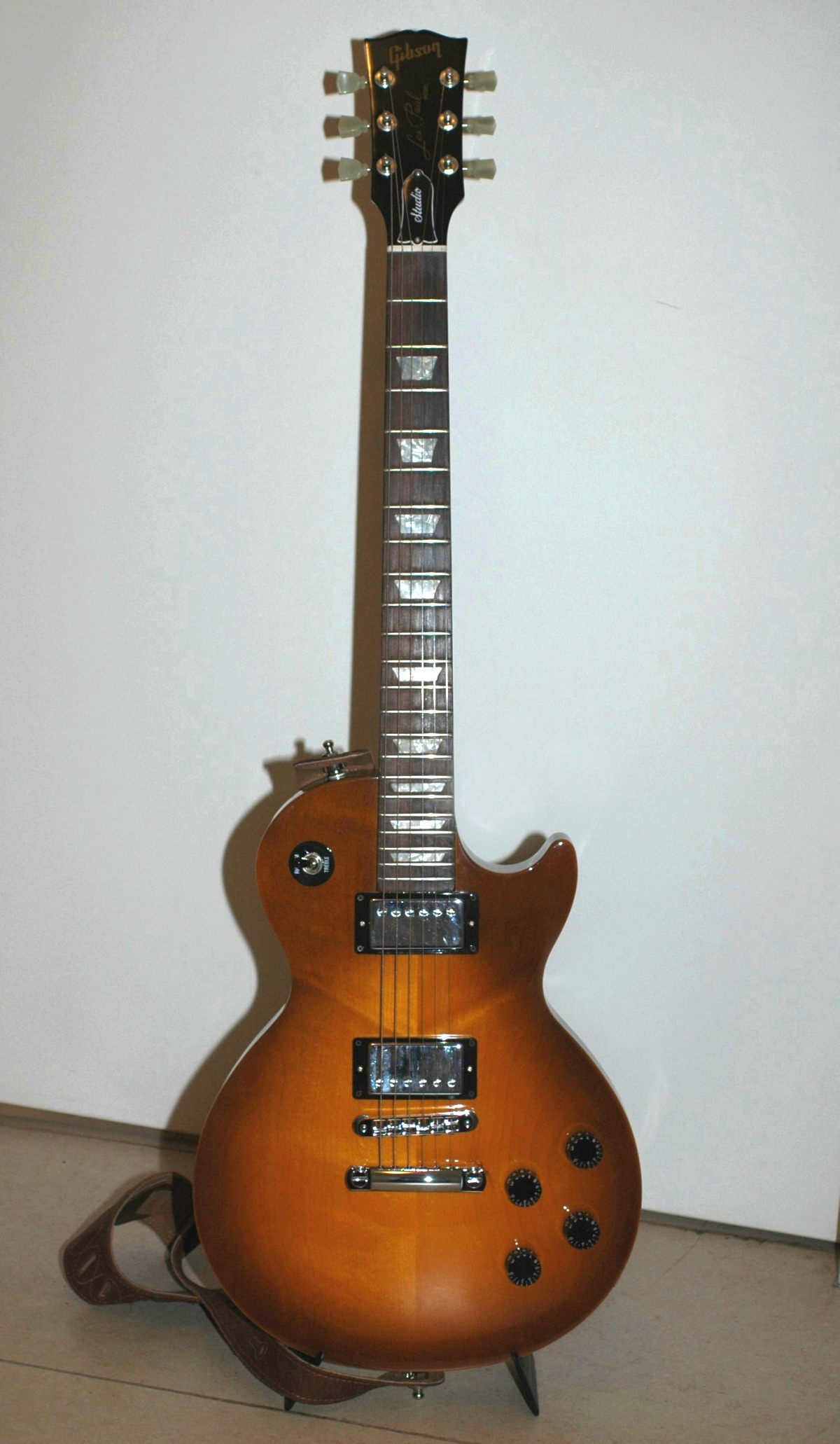 Bildbeschreibung: Gitarre Gibson Les Paul Studio Quelle: selbst fotografiert Fotograf: Joachim Hensel-Losch Datum: Feb. 09. 2006 andere Versionen